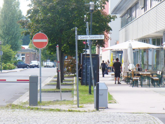 Studio Babelsberg - GW-Pabst-Strasse